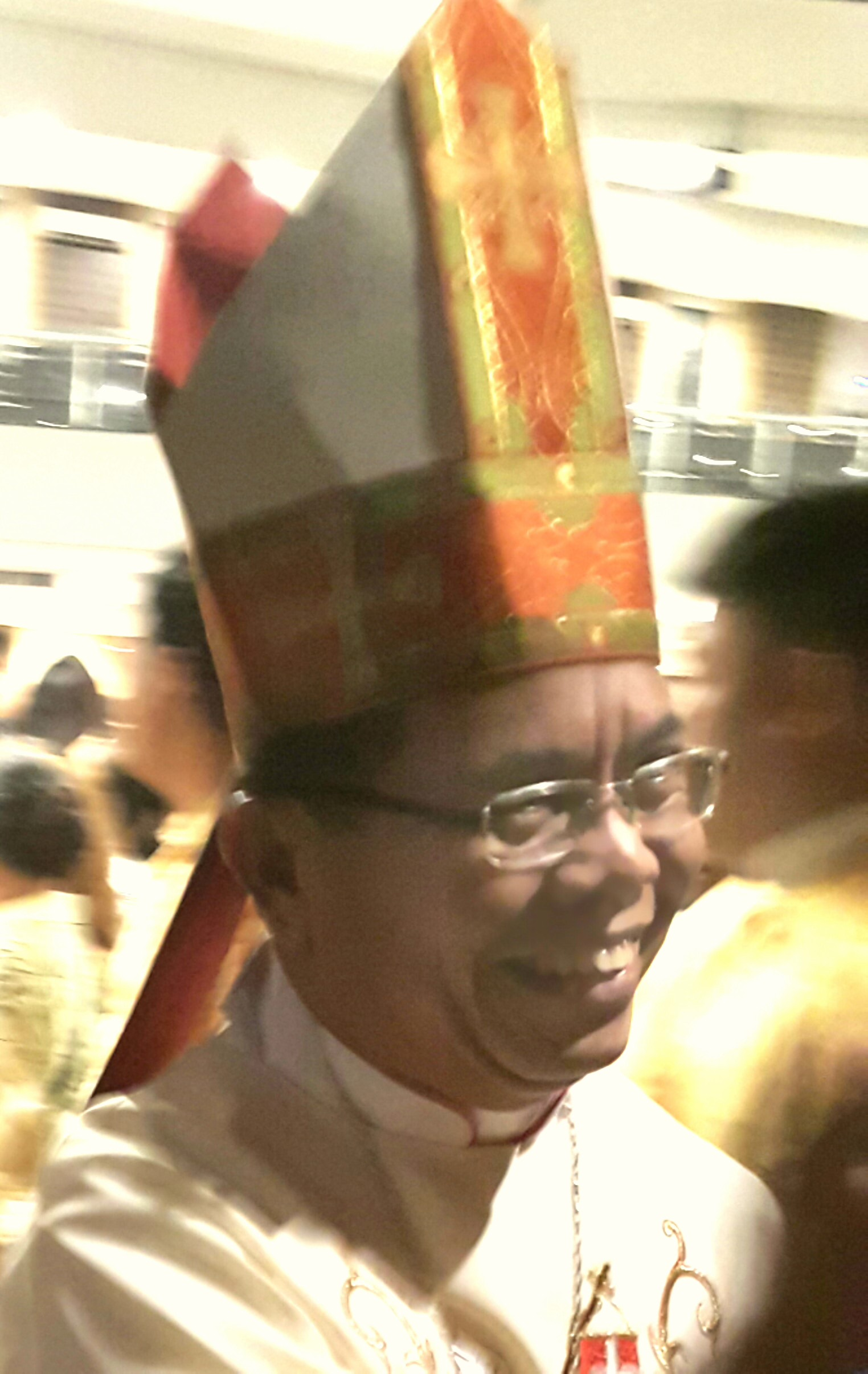 Mgr Ludovicus Simanullang, Uskup Sibolga